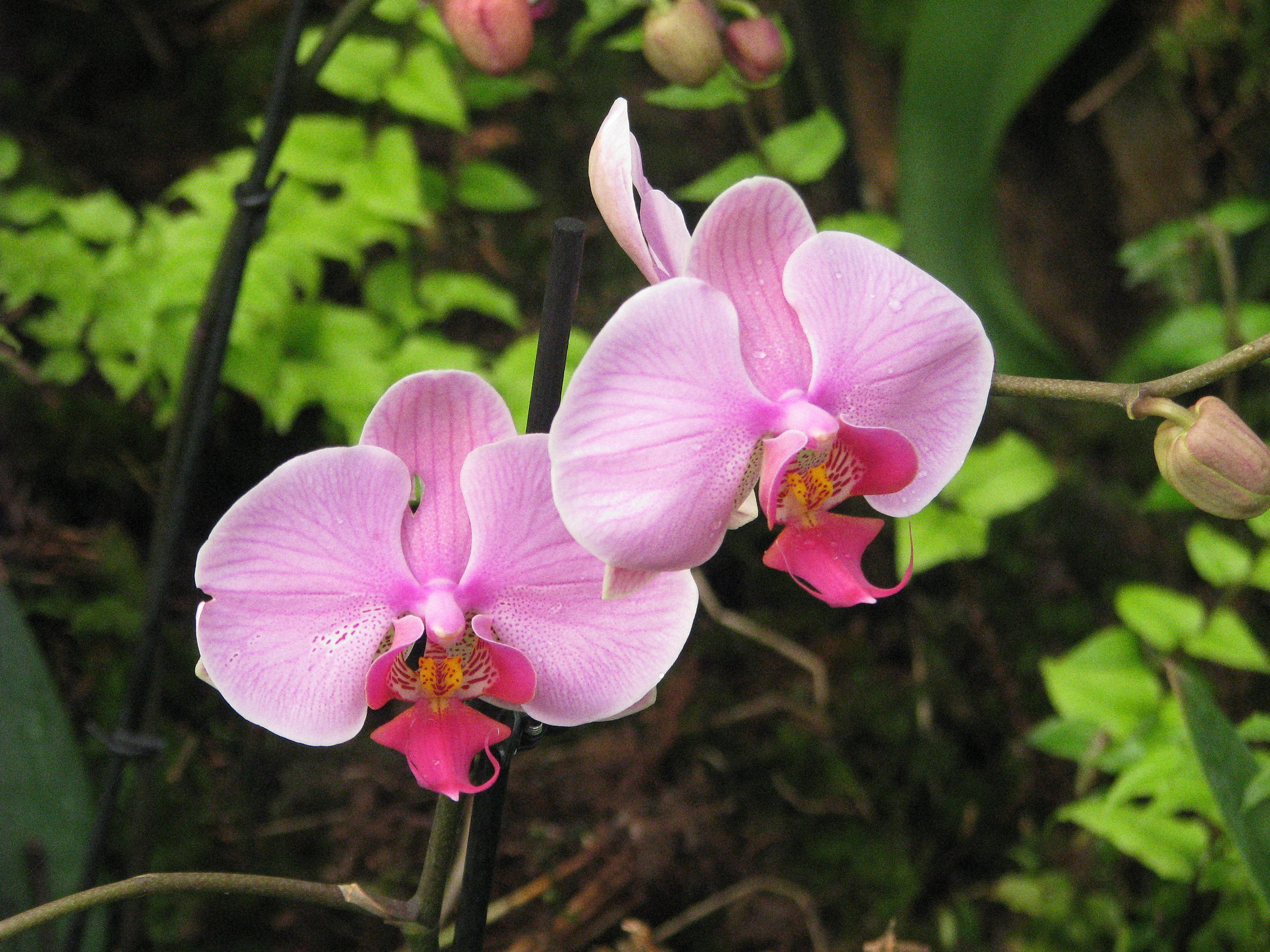 Phalaenopsis cultivar v Volčjem potoku